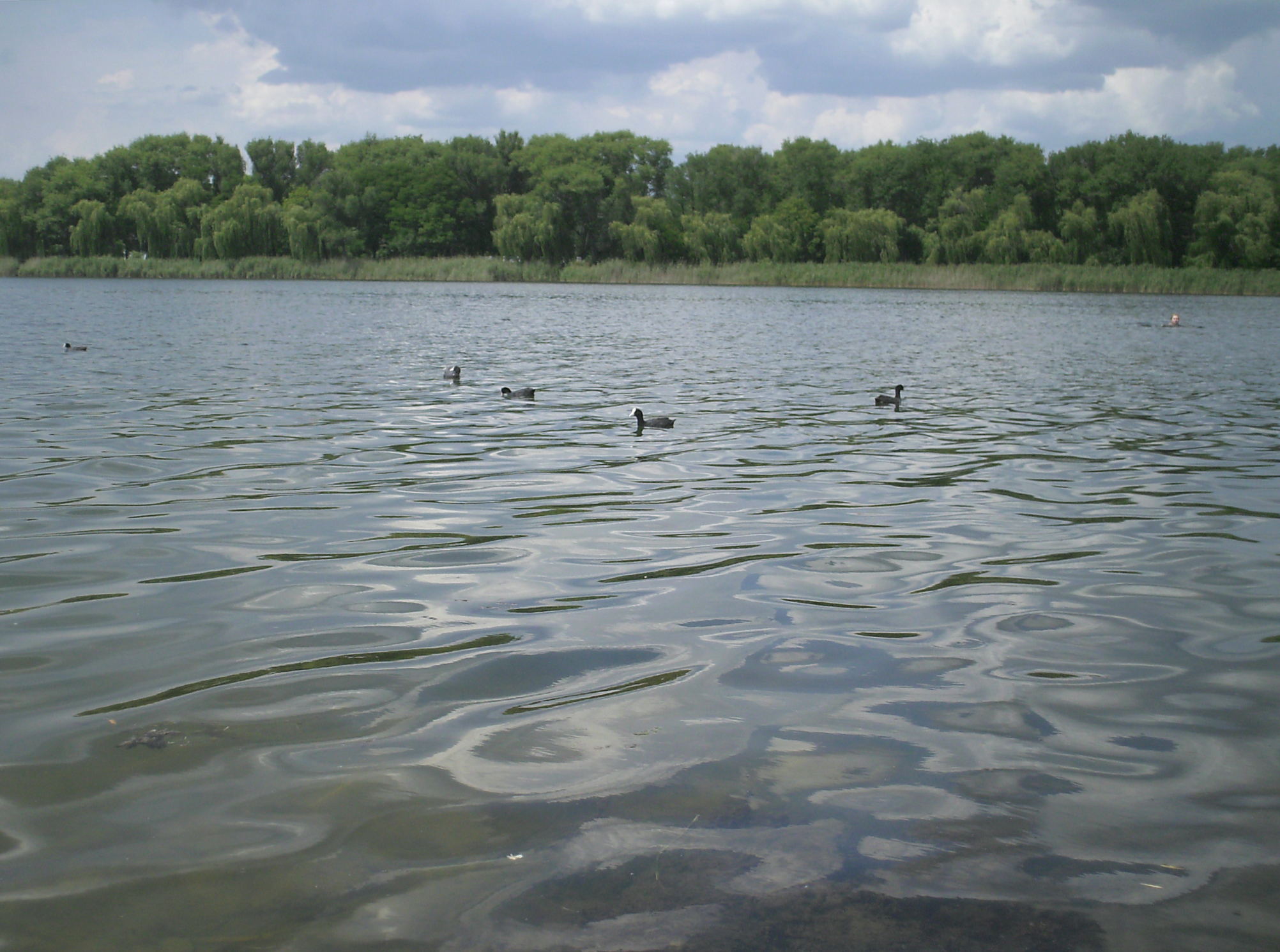 озеро Репное (Рапное), Славянский Курорт